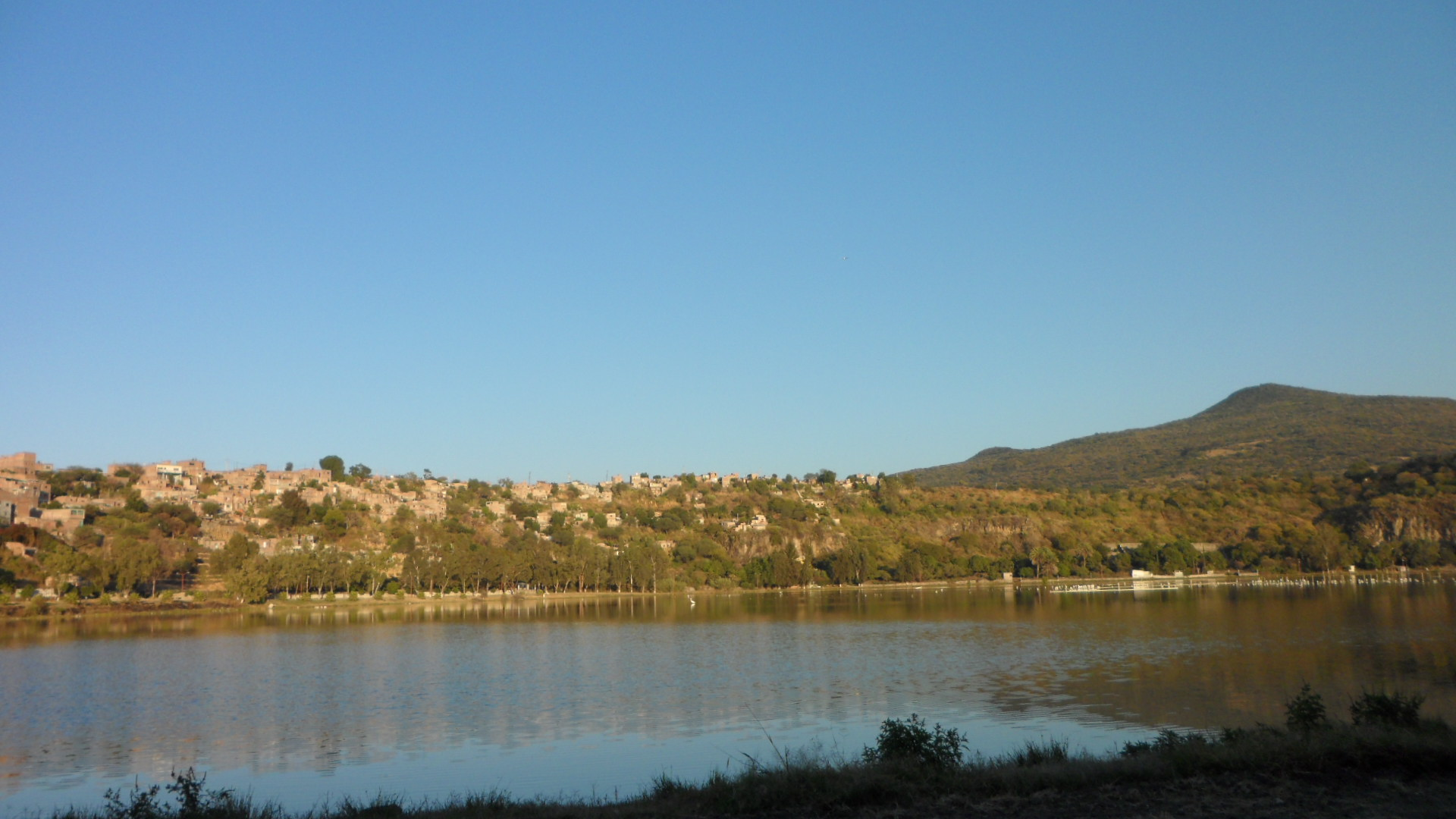 Crater Lago de Yuriria, Guanajuato.